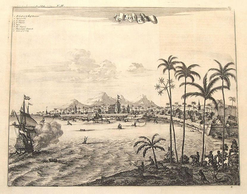 Kollam (Quilon), Kerala, Indien, um 1745